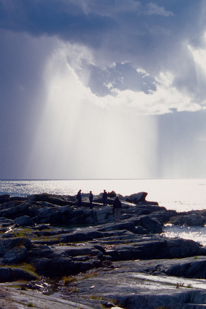 11 Août 2006 l'île aux Basques,Trois-Pistoles.P.Q. NIKON F 5 NIKKOR zoom80-400mm VR Fujichrome Provia F 400